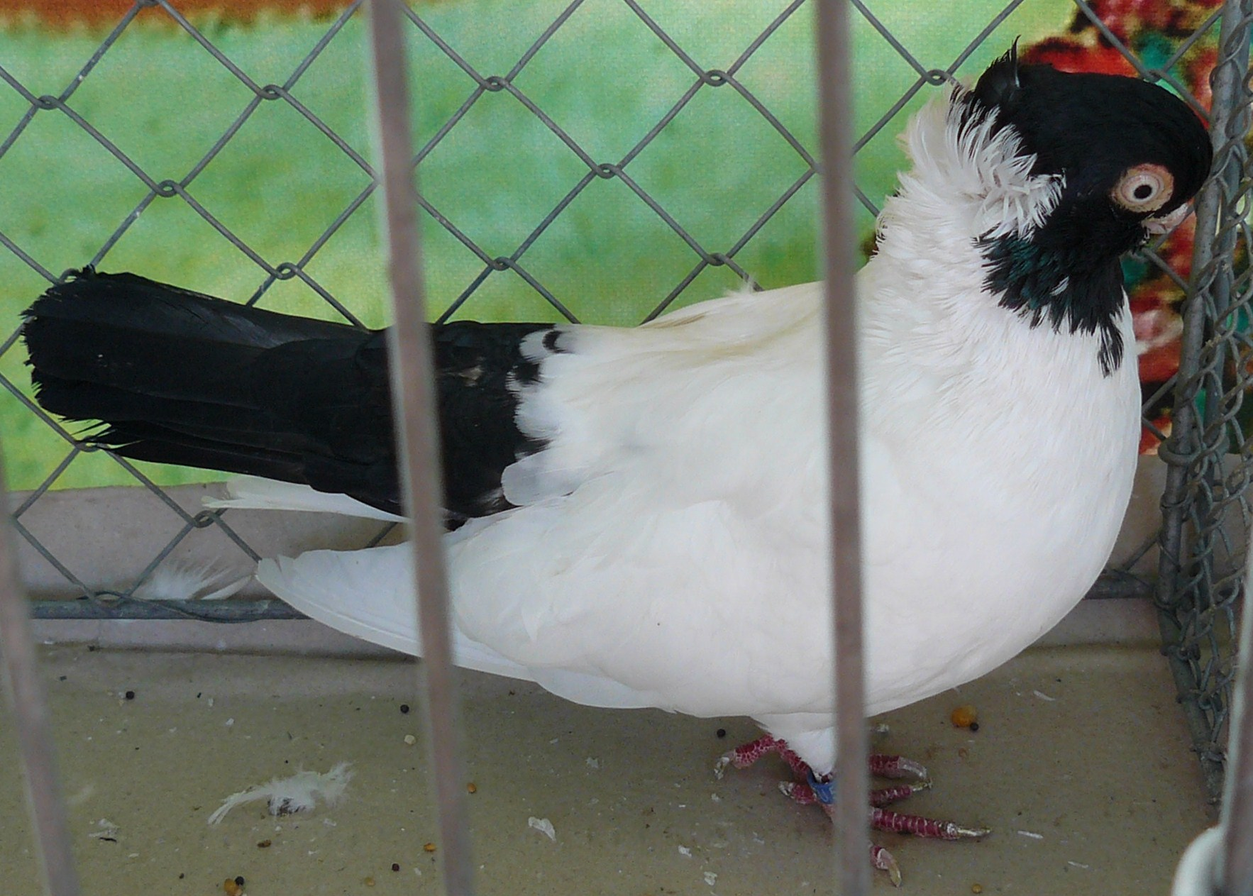 Barwnogłówka poznańska na Dożynkach Miejskich w Poznaniu - 2015, Park Wilsona.